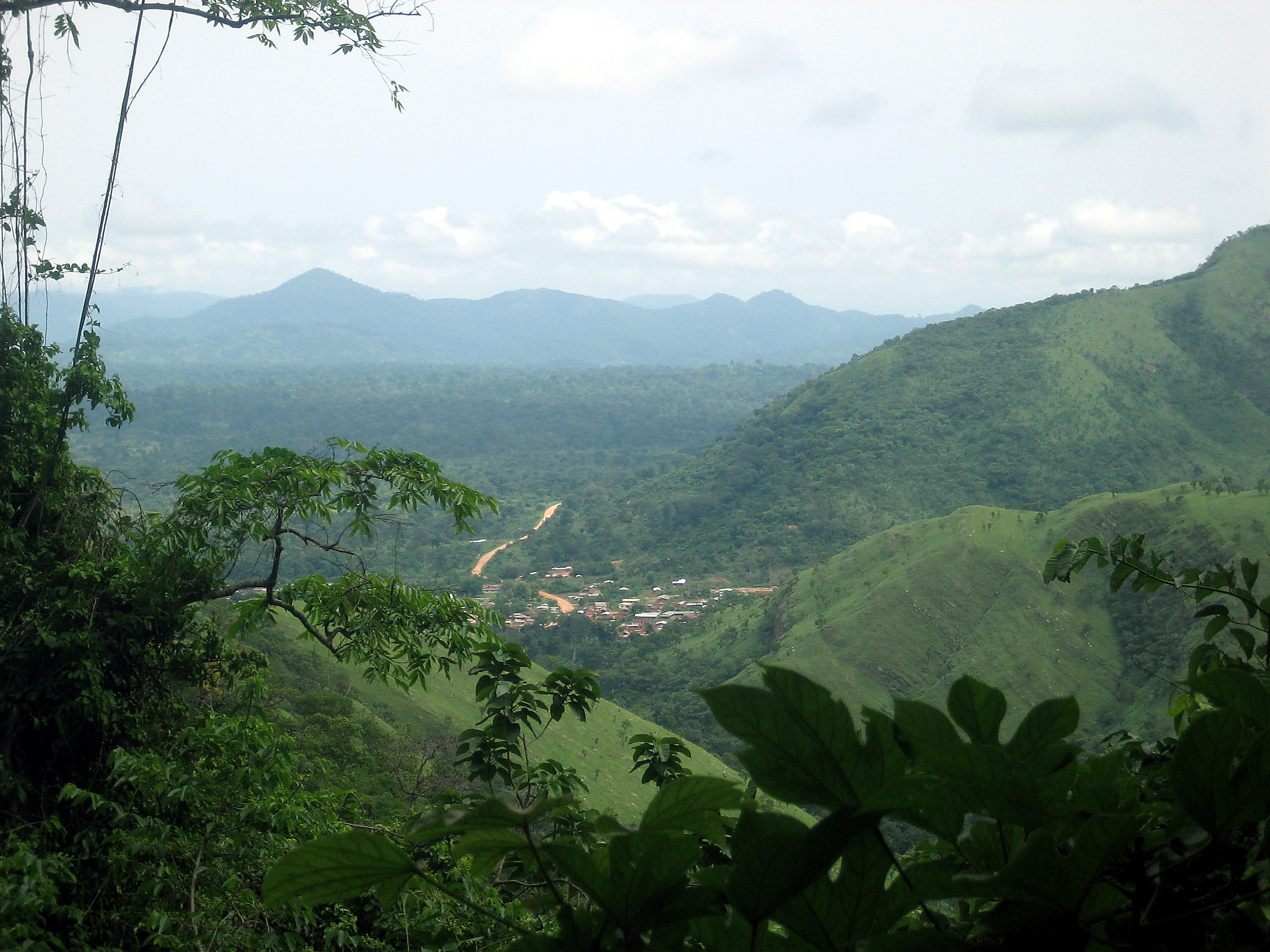 View at Wli, Volta region in Ghana